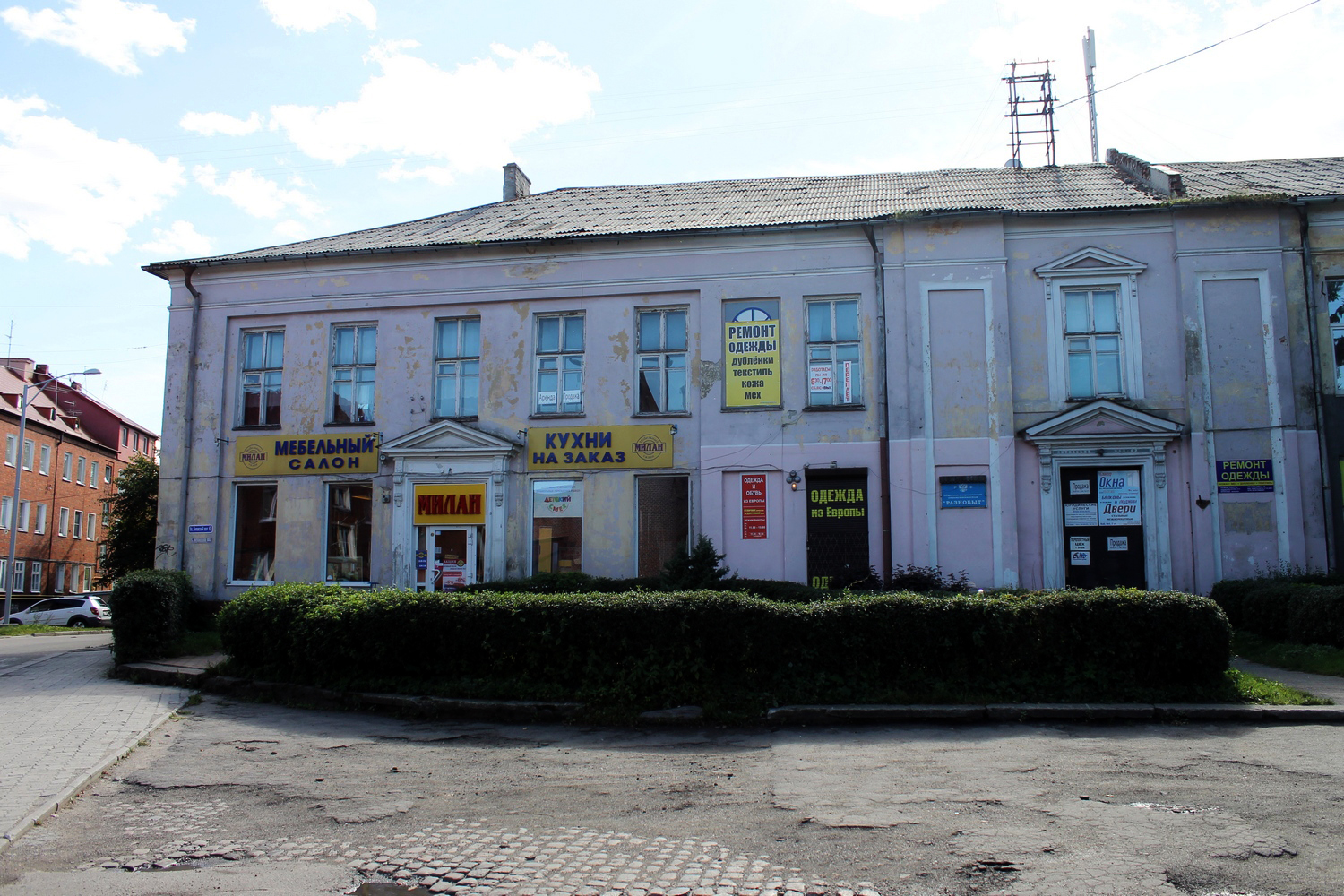 Королевский сиротский дом, нынче дом №62 на Литовском валу, включает себя разнообразные офисы, мастерские и магазины